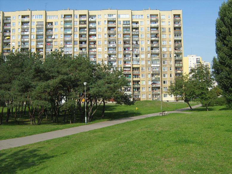 Ostrobramska Housing estate in Warsaw (Poland) Osiedle Ostrobramska w Warszawie